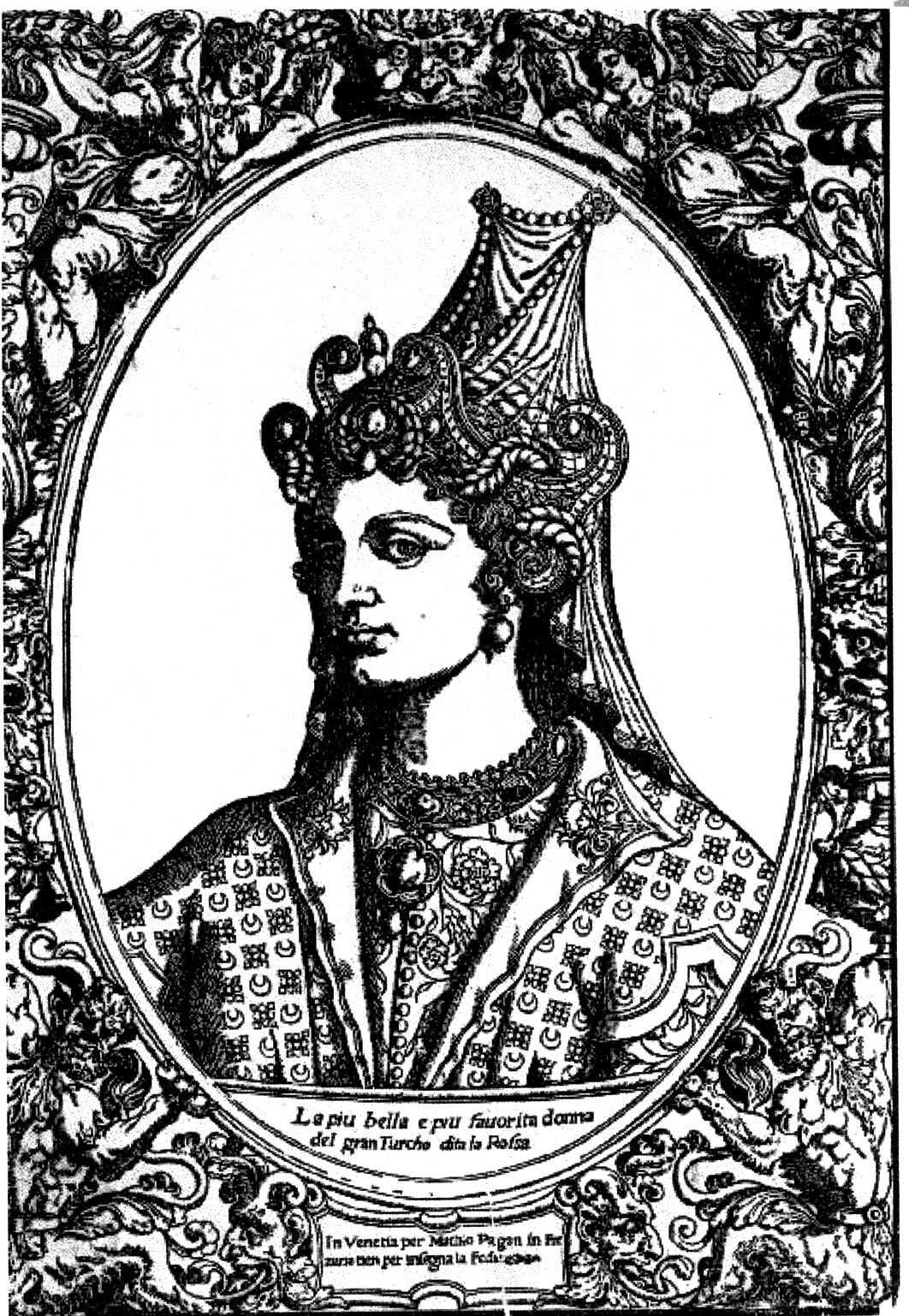 La piu bella e la piu favorita donna del gran Turcho dita la Rossa